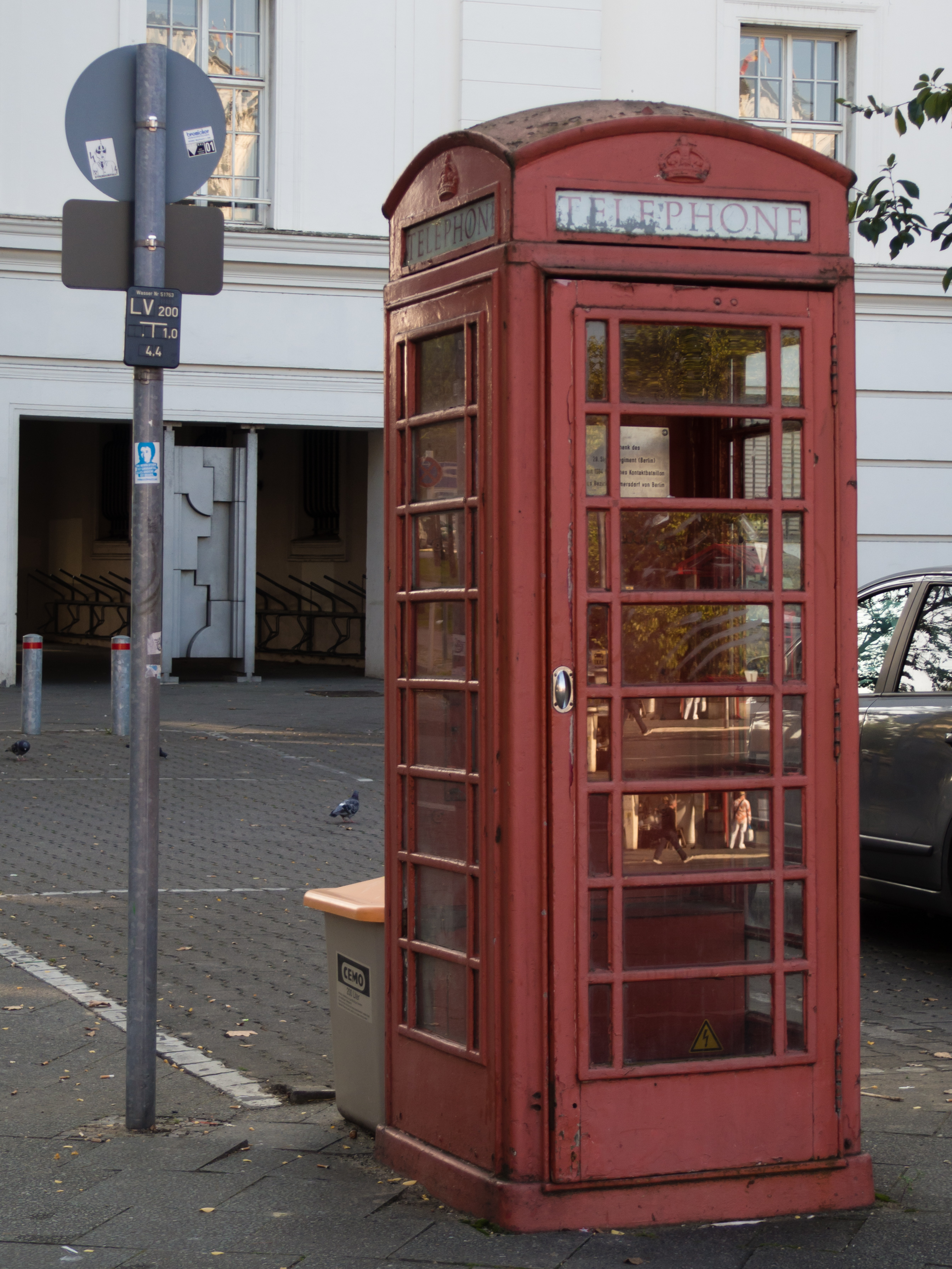 Britische Telefonzelle am Fehrbelliner Platz